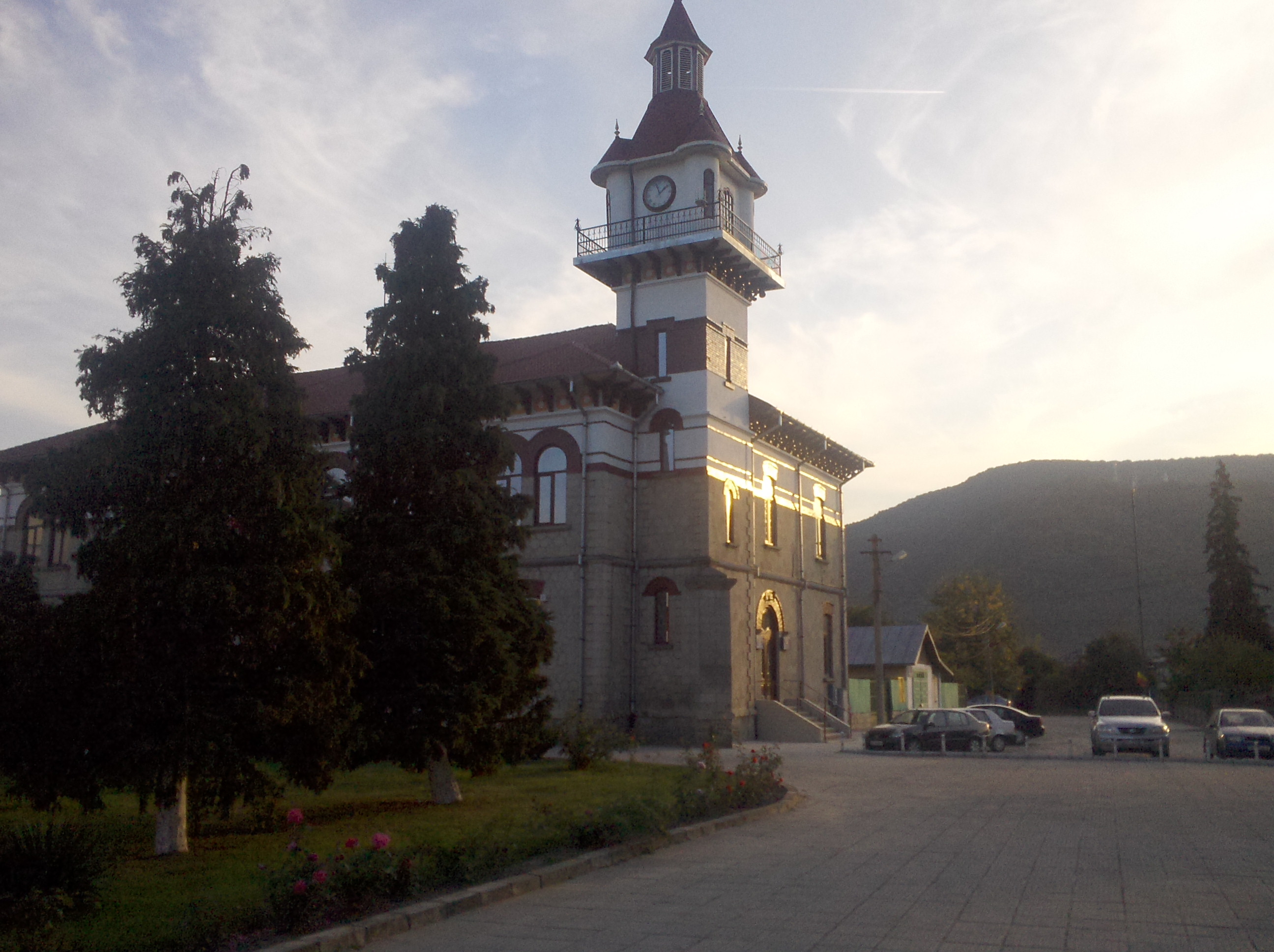 Ajuntament de la ciutat de Târgu Ocna en Romania